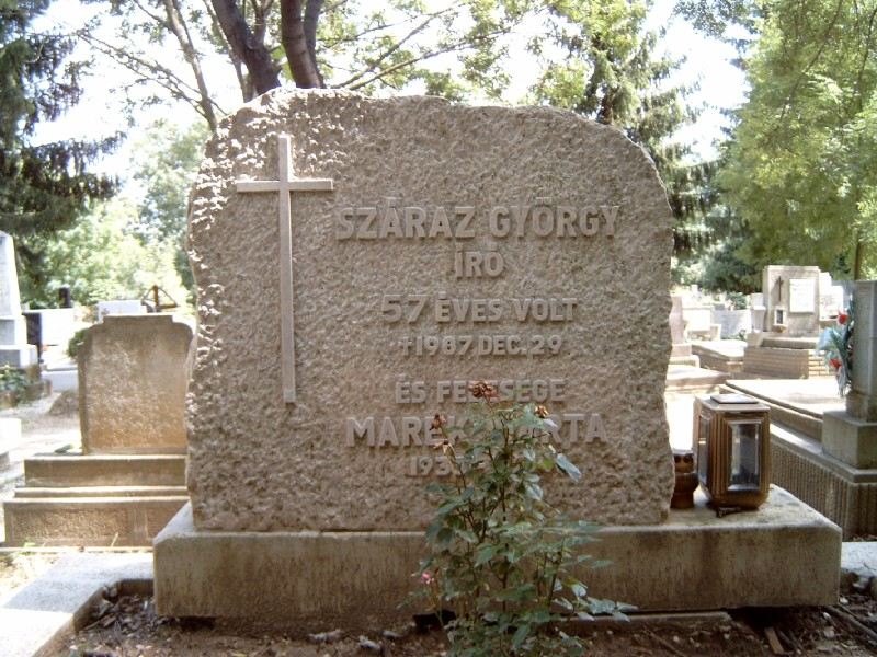 Száraz György (Bp., 1930. nov. 3. – Bp., 1987. dec. 29.) író, publicista sírja Budapesten. Farkasréti temető: 2-1-29/30.